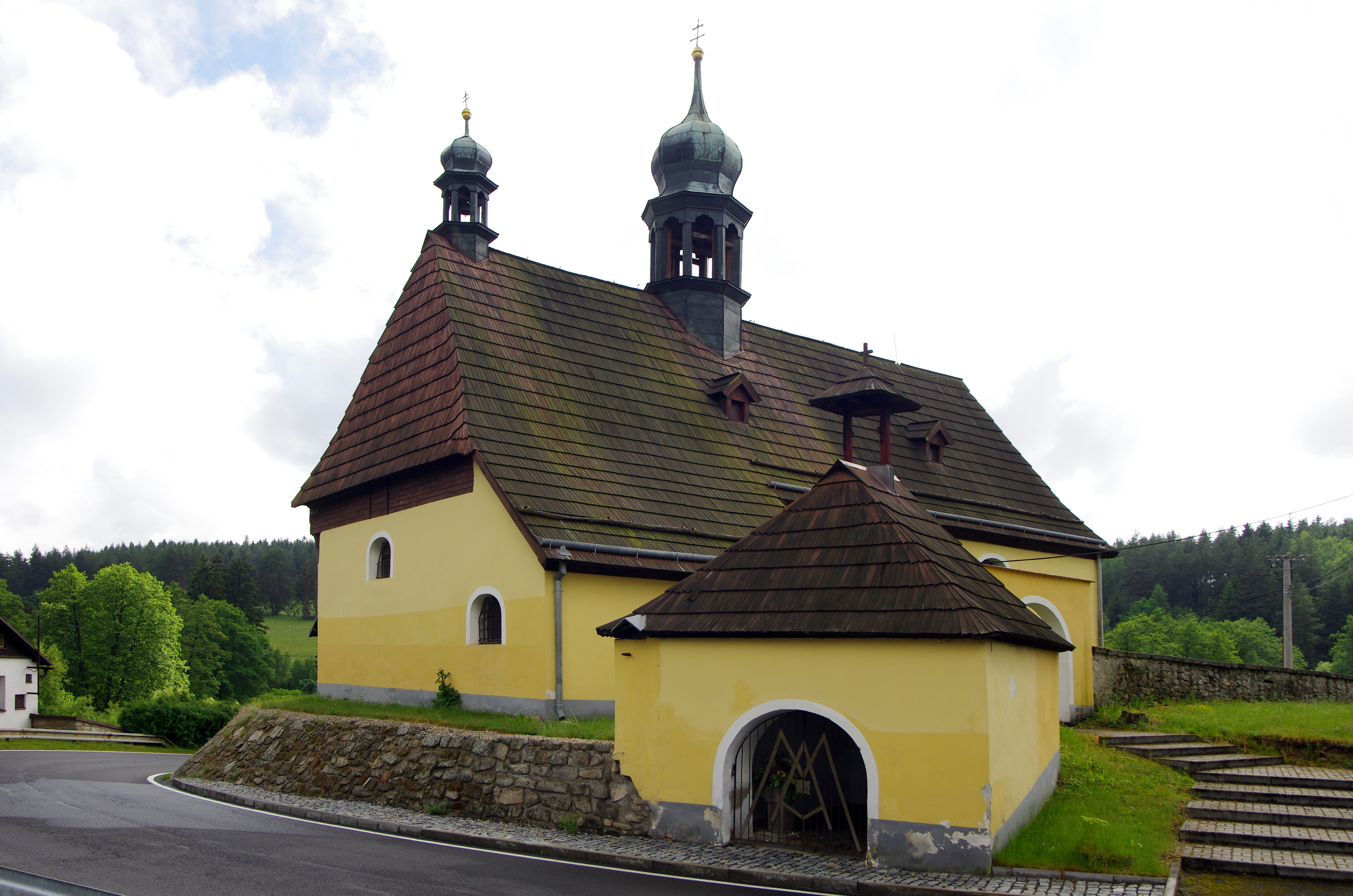 Kostel svatého Erharta, st. 24, Tatrovice.